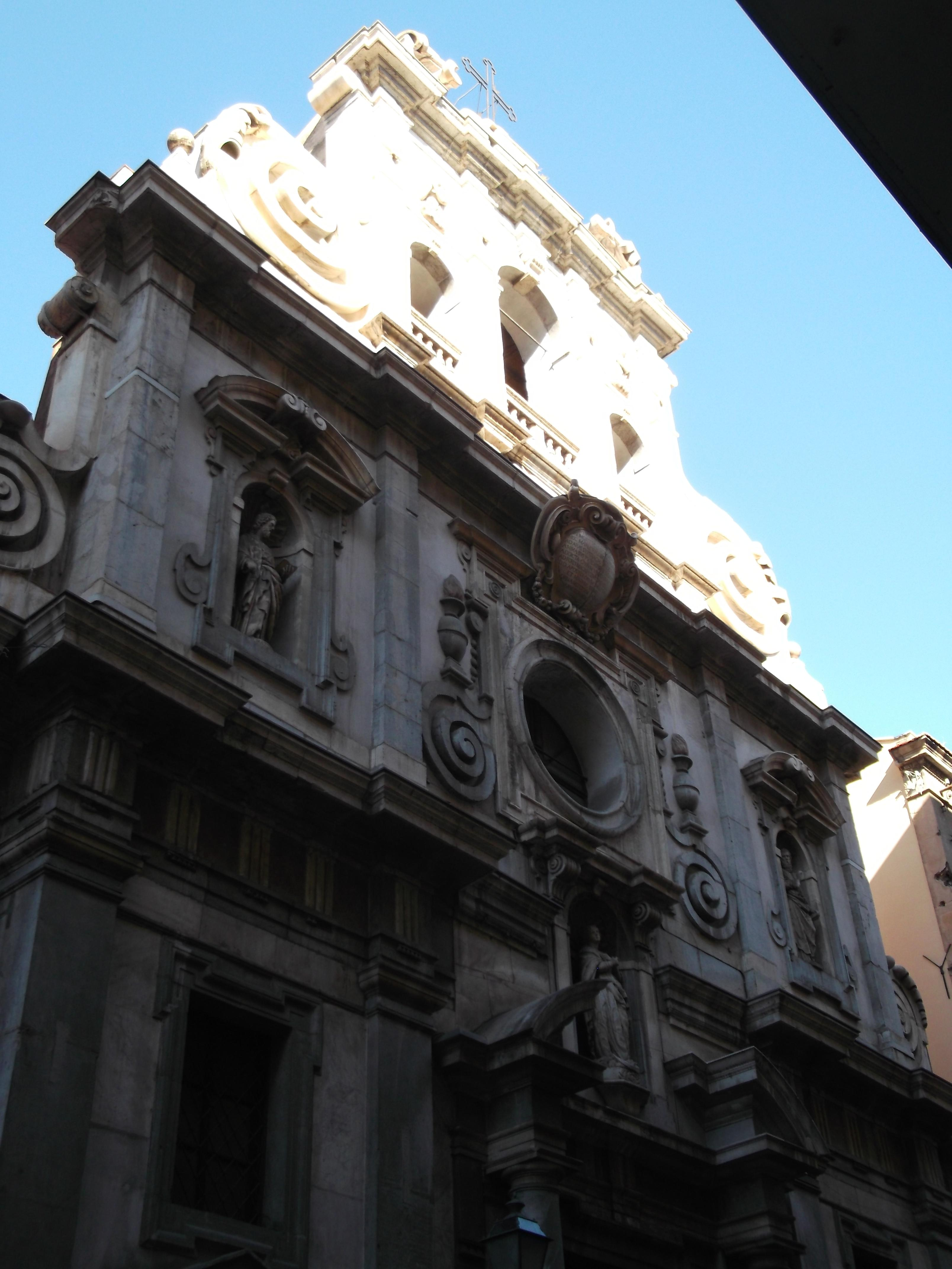 Facciata